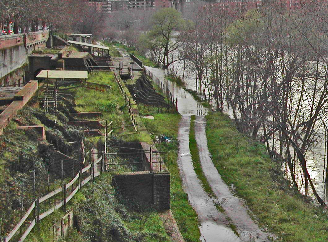 Roma, Testaccio: resti dei magazzini romani sul Tevere (sull'altra riva, Porta Portese)